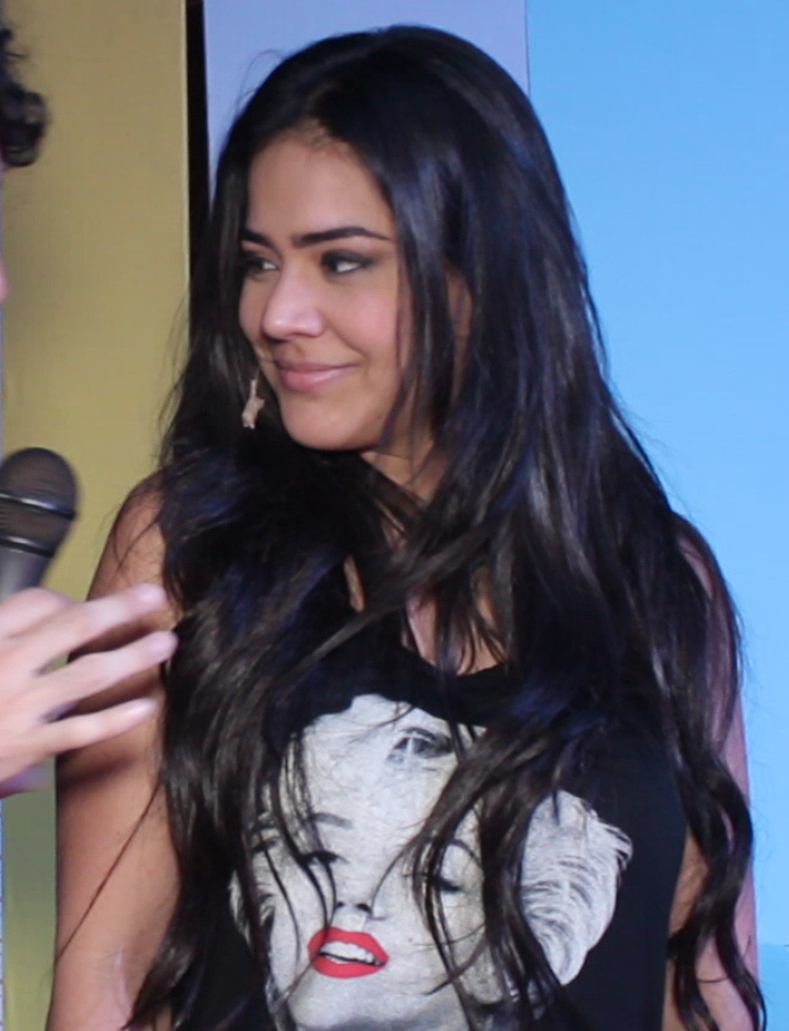 Michela Pincay durante los ensayos del musical Engrapados en 2015.